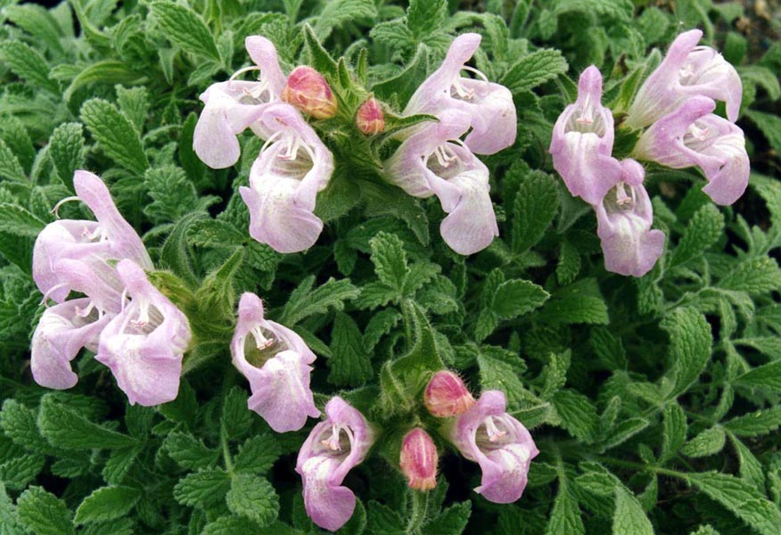 Salvia caespitosa